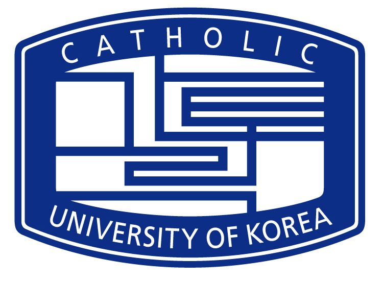 가톨릭대학교 로고